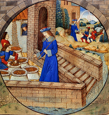 Het graan wordt over gelijke zakken verdeeld. Miniatuur in de Biblia figurata, gemaakt voor Raphaël de Mercatellis, Gent (?), eind 15e eeuw. Gent, Kathedraal, Ms. 10, fol. 74